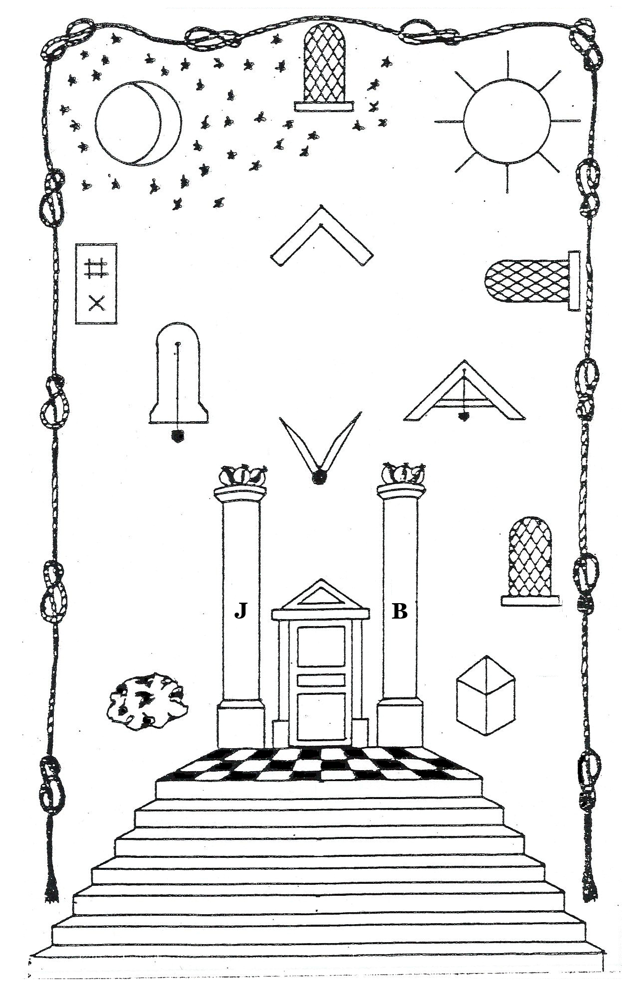 Tableau de loge d'apprenti selon une reconstitution personnelle et issue du Régulateur du Maçon édité en 1801.